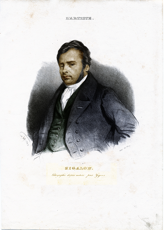 Jean Gigoux, Xavier Sigalon, lithographie parue dans L'Artiste.